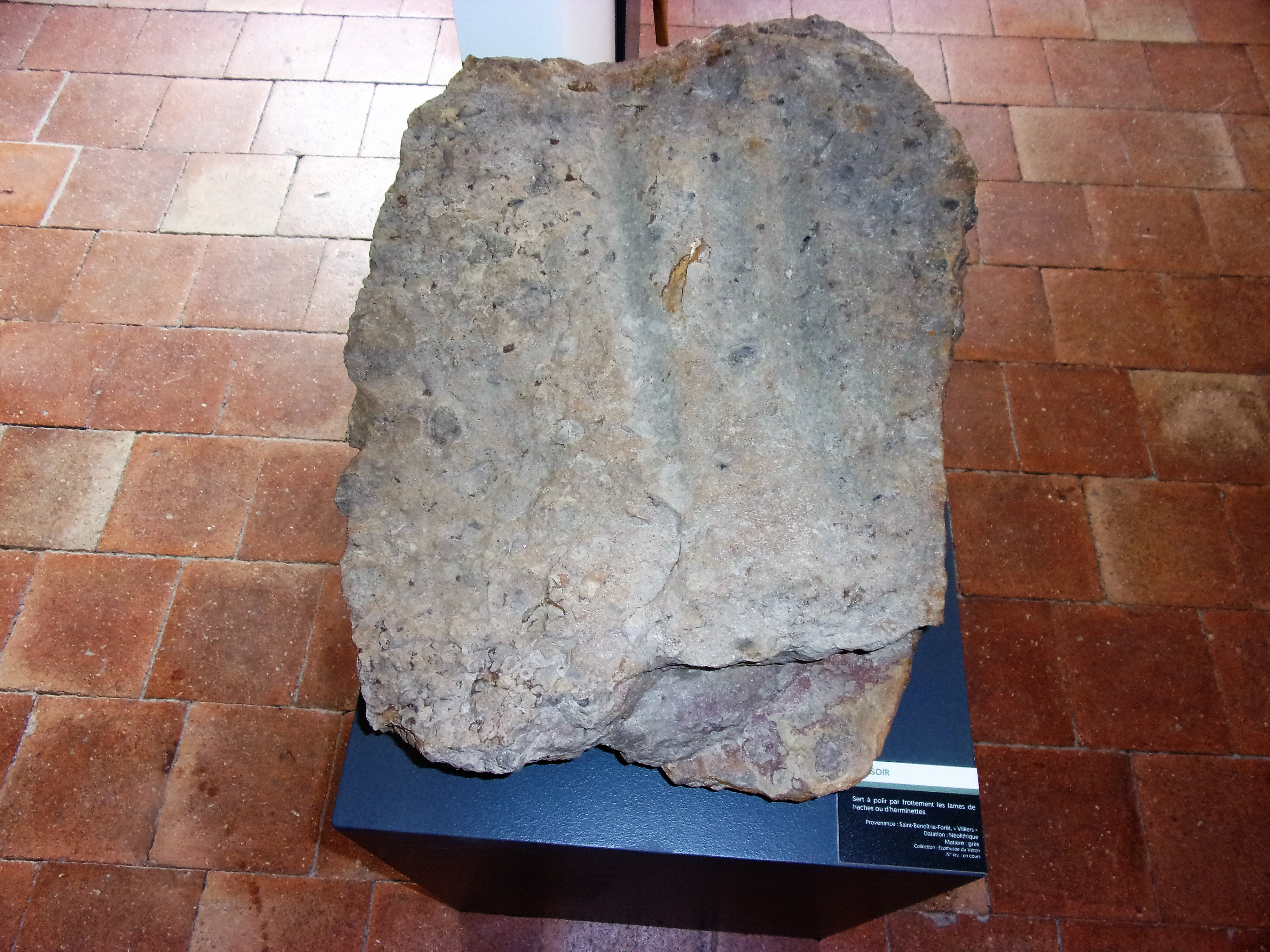 Polissoir néolithique de Saint-Benoît-la-Forêt. Dépôt : écomusée du Véron.